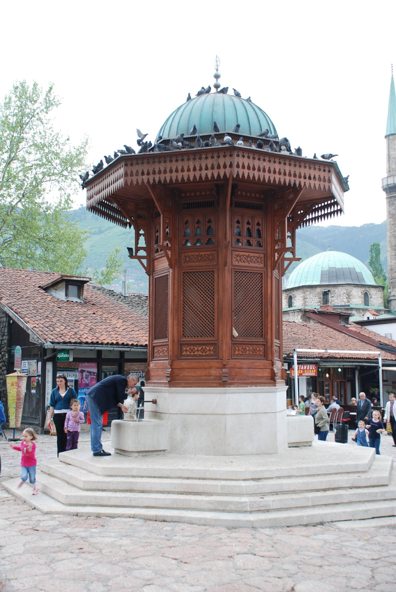 94315-Saravejo